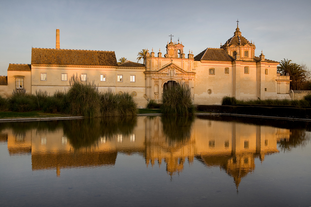 Monasterio de Santa María de las Cuevas identificador= RI-AR-0000046